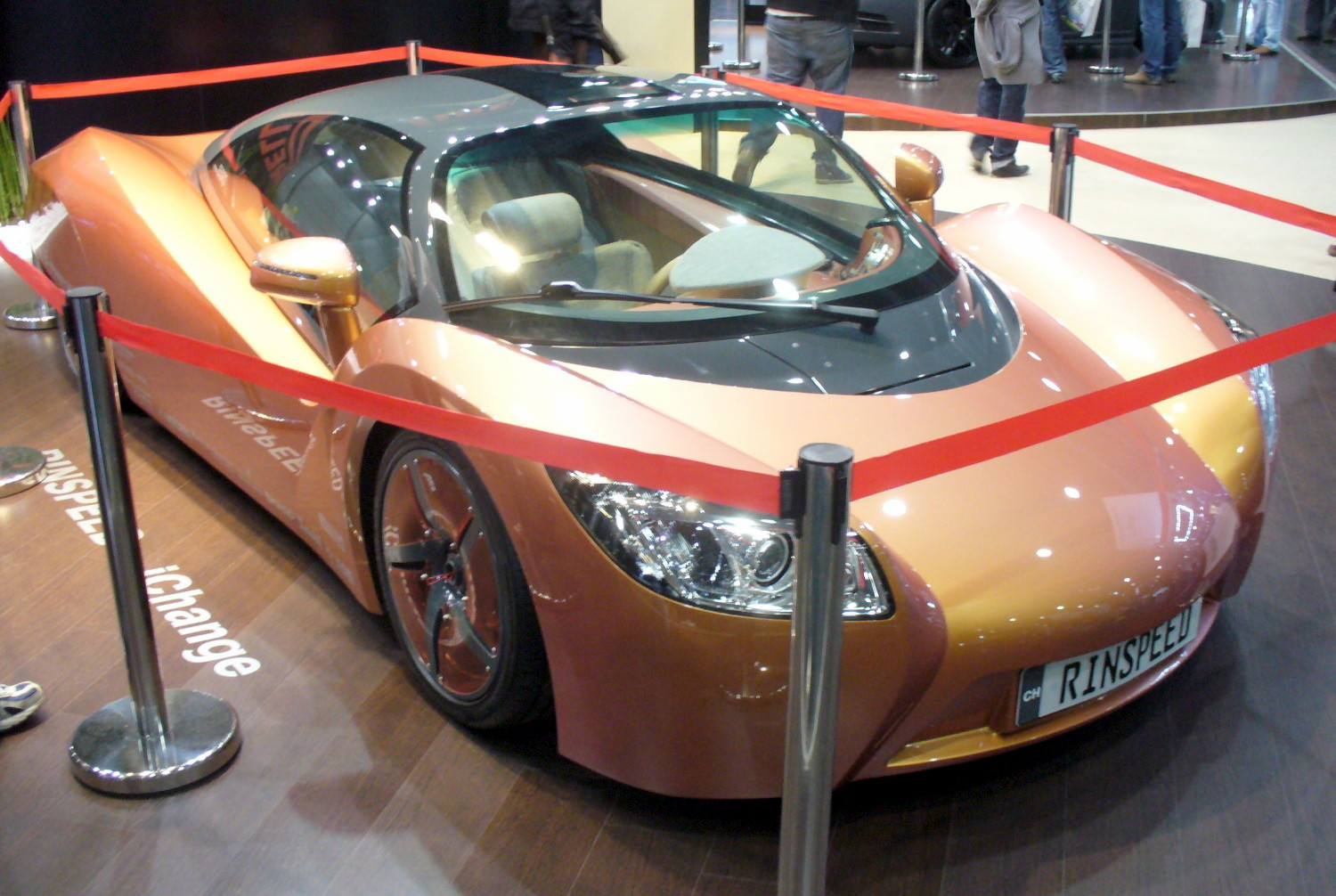 Rinspeed iChange